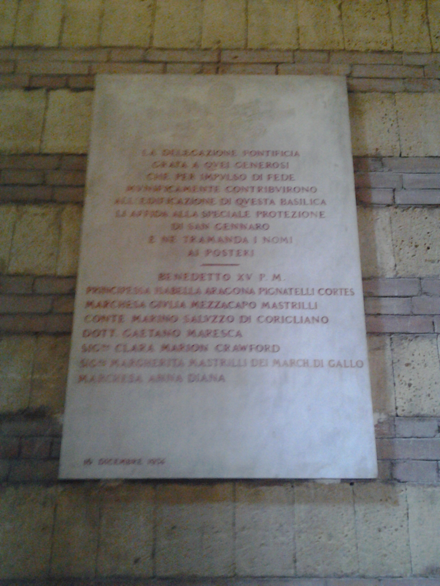 Basilica di San Gennaro ad Antignano (Napoli): lapide commemorativa di marmo bianco con iscrizioni in cinabro, del 1934, posizionata nel transetto sinistro, sulla parete di fondo, a sinistra, riporta in italiano: «LA DELEGAZIONE PONTIFICIA GRATA A QUEI GENEROSI CHE PER IMPULSO DI FEDE MUNIFICAMENTE CONTRIBUIRONO ALL'EDIFICAZIONE DI QUESTA BASILICA LA AFFIDA ALLA SPECIALE PROTEZIONE DI SAN GENNARO E NE TRAMANDA I NOMI AI POSTERI --- BENEDETTO XV P.M. PRINCIPESSA ISABELLA ARAGONA PIGNATELLI CORTES MARCHESA GIULIA MEZZACAPO MASTRILLI CONTE MARINO SALUZZO DI CORIGLIANO DOTT. GAETANO MARESCA SIG.RA CLARA MARSON CRAWFORD SIG.RA MARGHERITA MASTRILLI DEI MARCH. DI GALLO MARCHESA ANNA DIANA 16 DICEMBRE 1934»